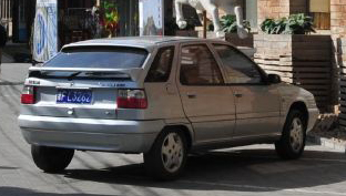 Dongfeng-Citroën Fukang DC7140